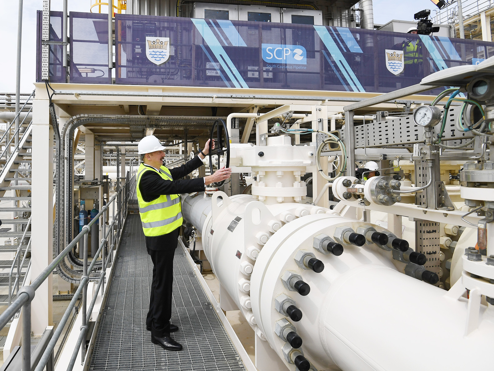 Präsident der Republik Aserbaidschan Ilham Aliyev nahm an der offiziellen Eröffnungsfeier des Südlichen Gaskorridors teil